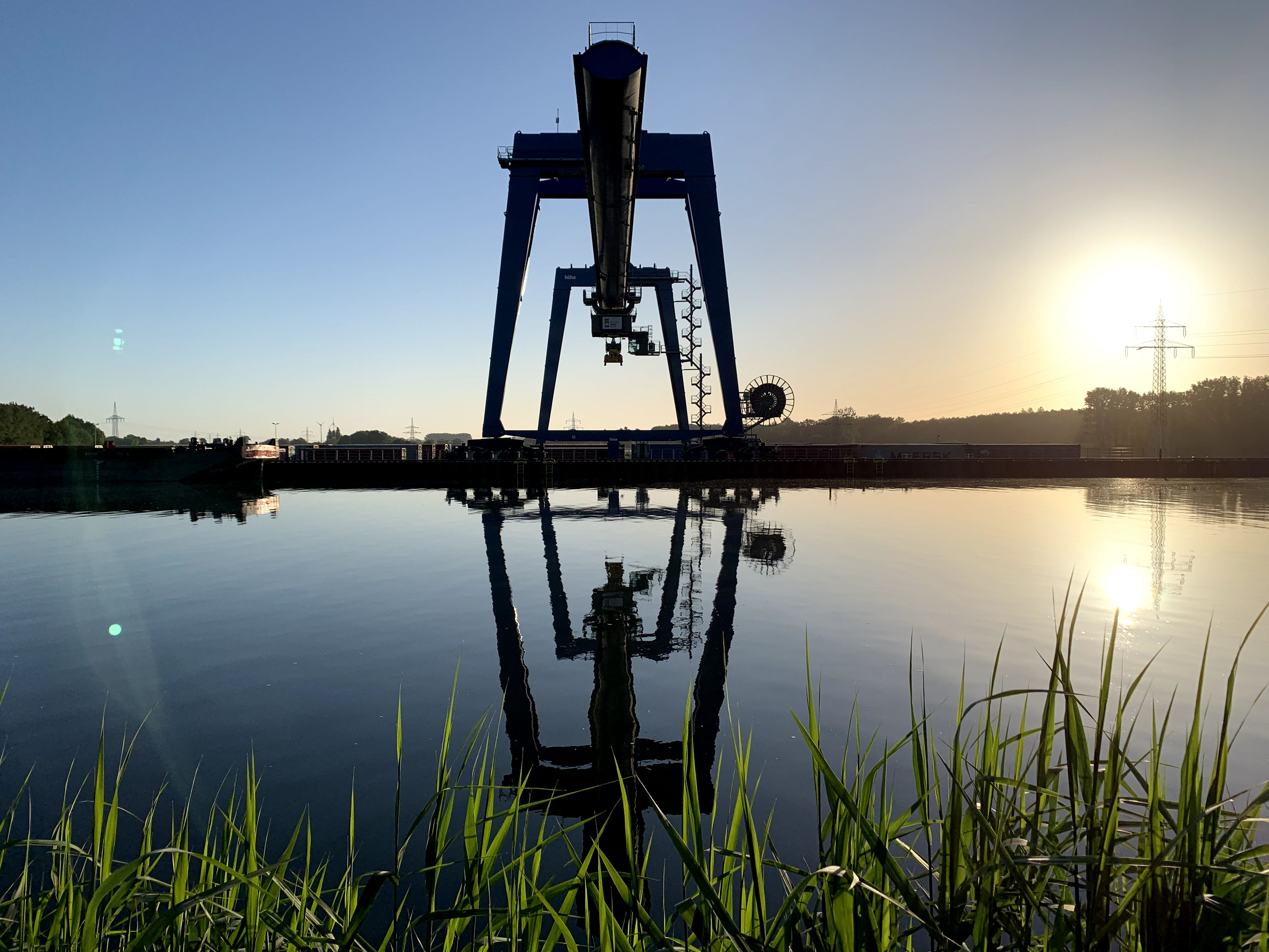 Portalkran im RegioPort OWL